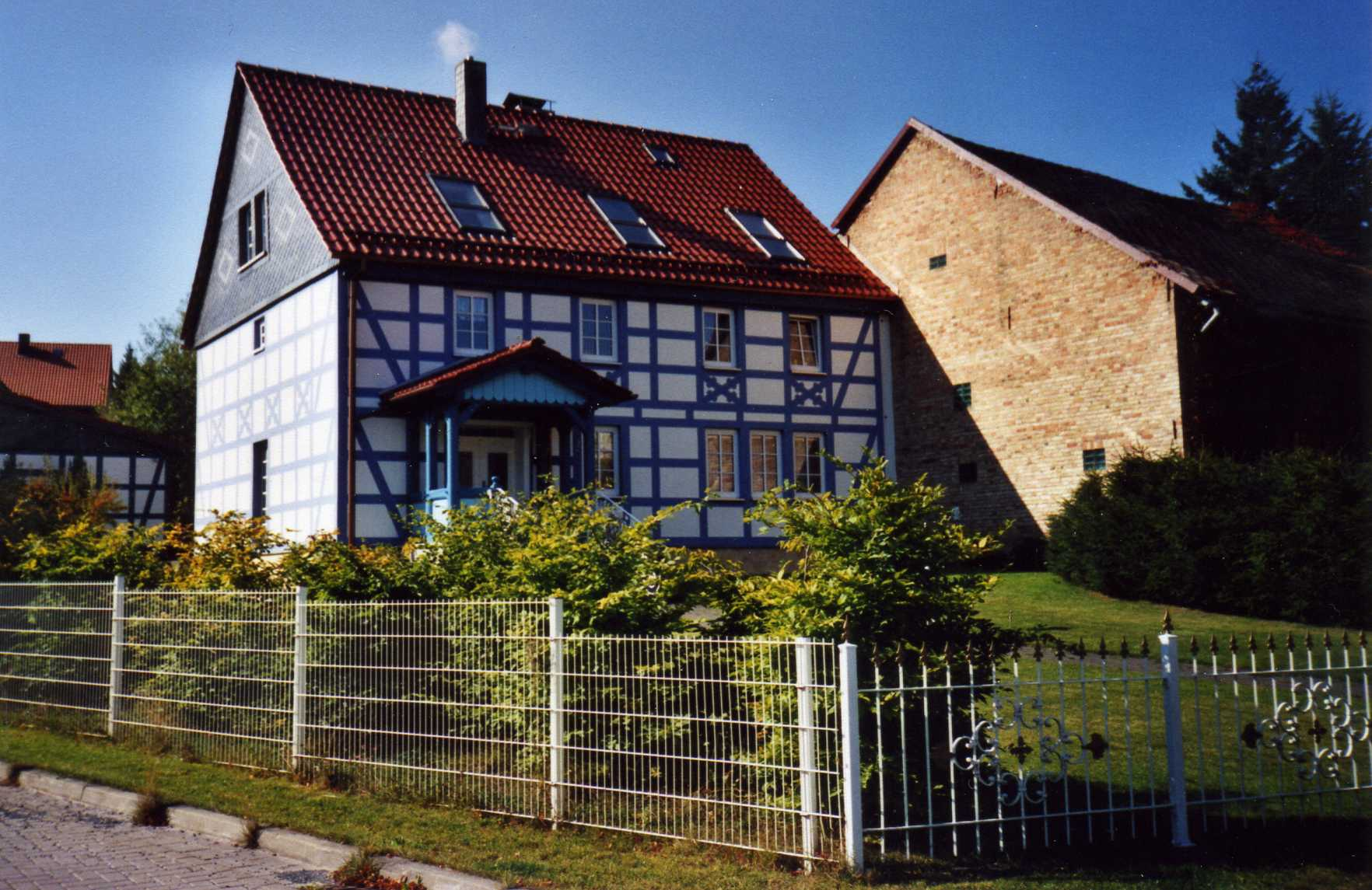 Fachwerkhaus in Stiege (Harz)